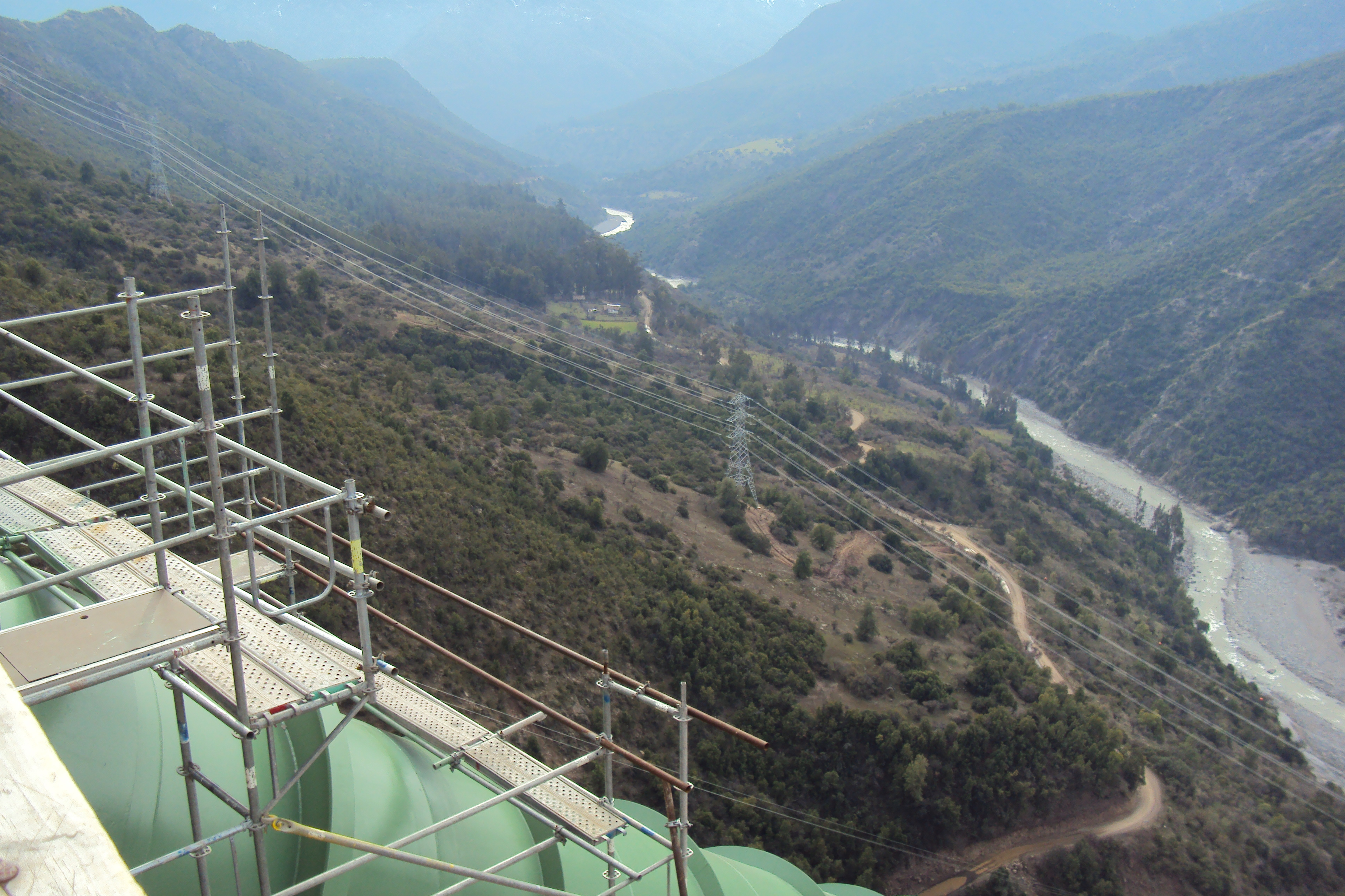 Central La Higuera y Rio Tinguiririca